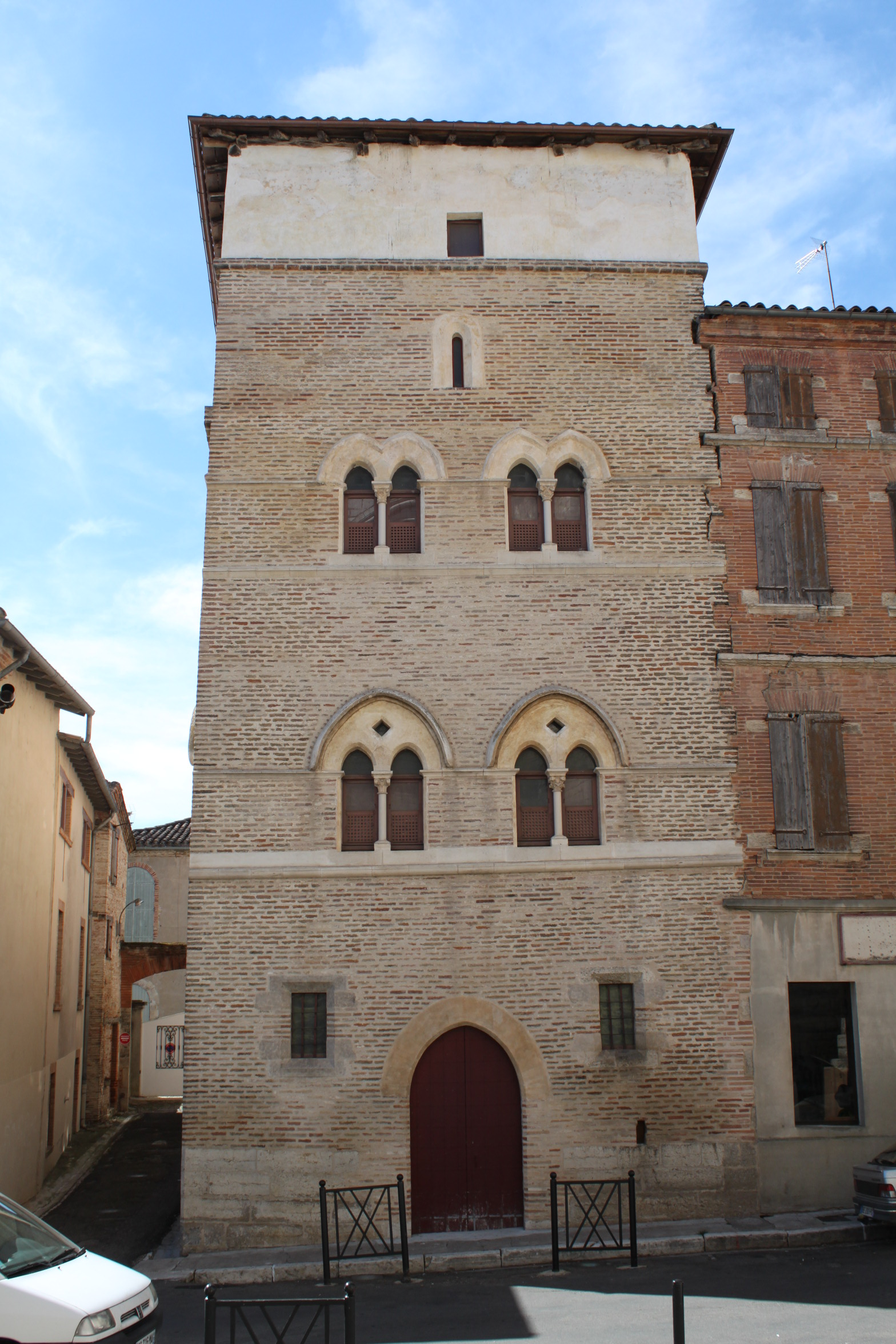 Tour d'Arlet, Place de l'Église (Classé, 1989) .